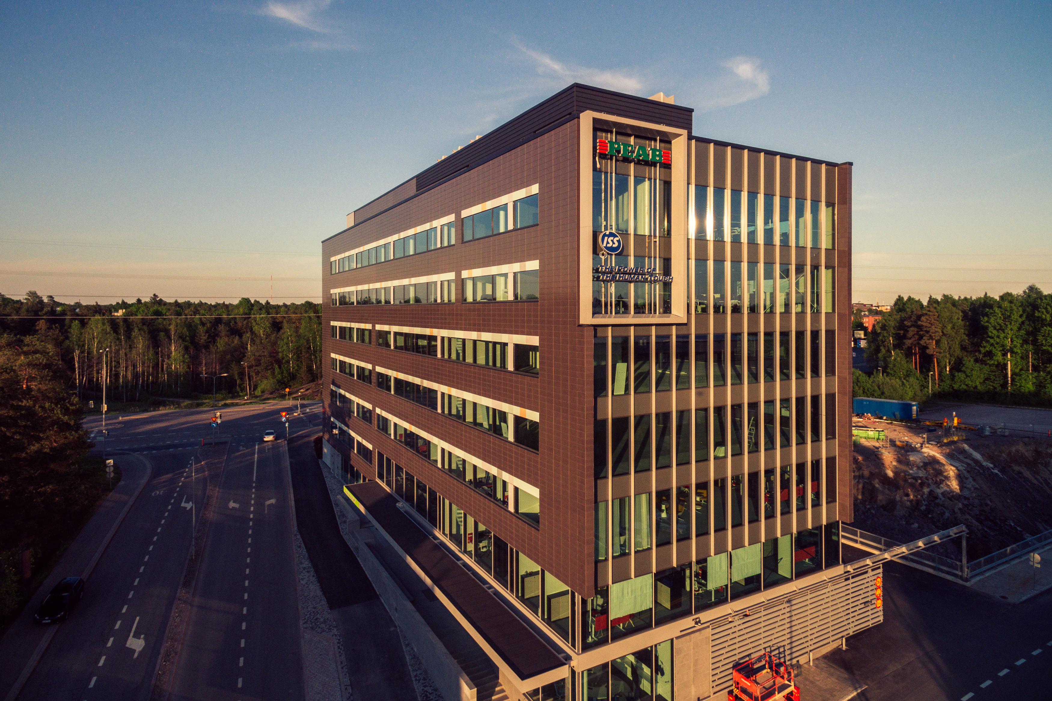 ISS Palveluiden pääkonttori sijaitsee Ultimes Business Gardenissa Helsingin Pitäjänmäessä.